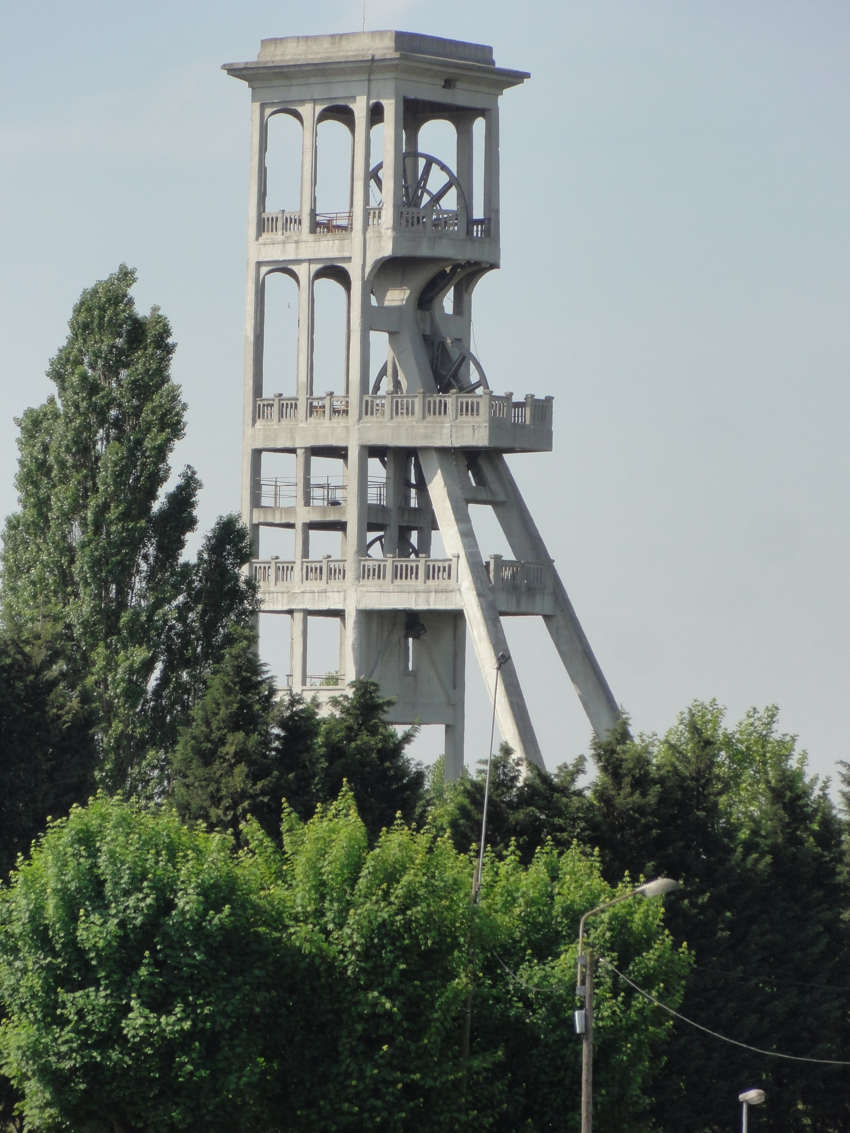 La Fosse Dutemple de la Compagnie des mines d'Anzin était un charbonnage constitué de deux puits situé à Valenciennes, Nord, Nord-Pas-de-Calais, France.